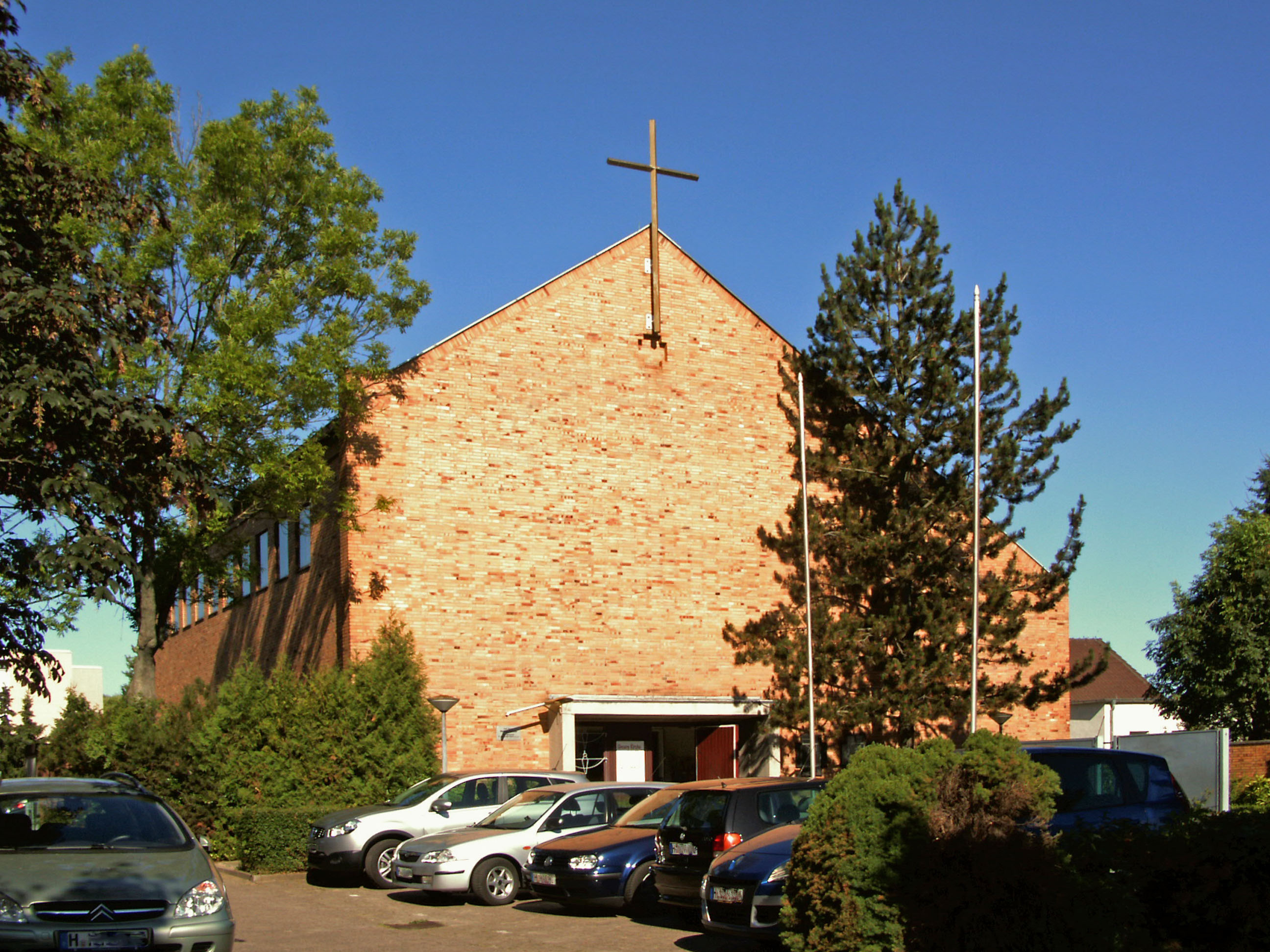 Katholische Kirche Heilige Familie in Empelde, Ortsteil von Ronnenberg